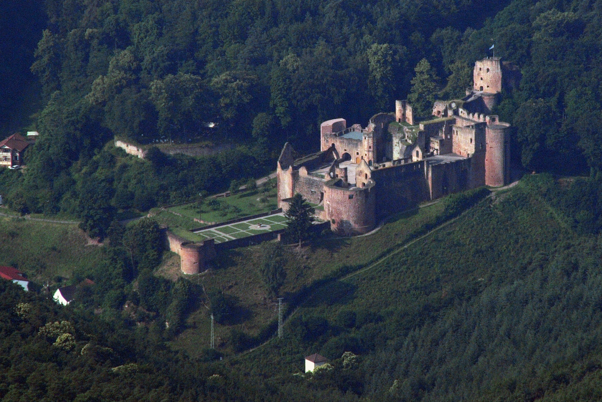 Hardenburg bei Bad Dürkheim: Luftaufnahme